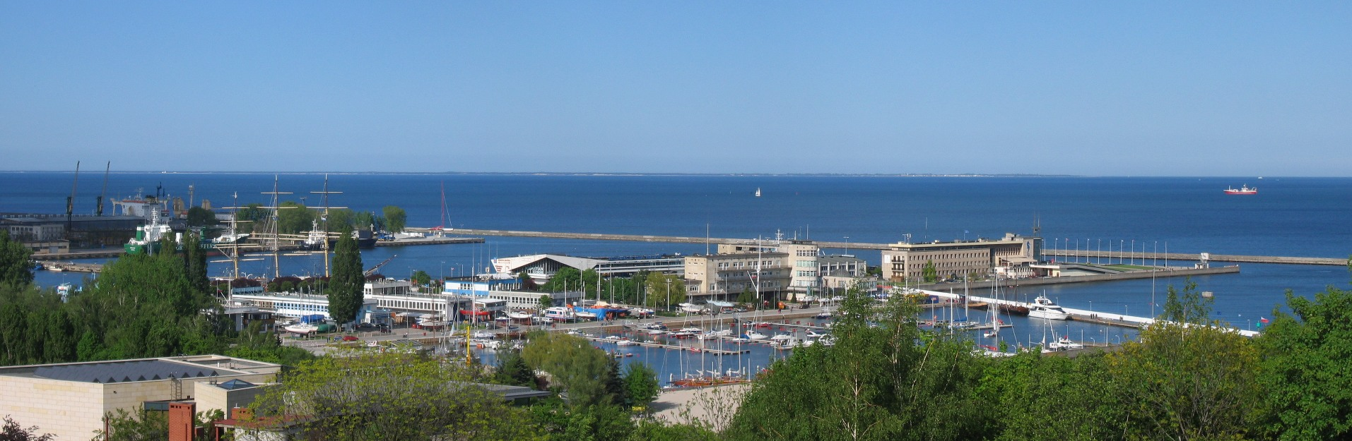 View from Kamienna Góra, Gdynia, Poland 2006